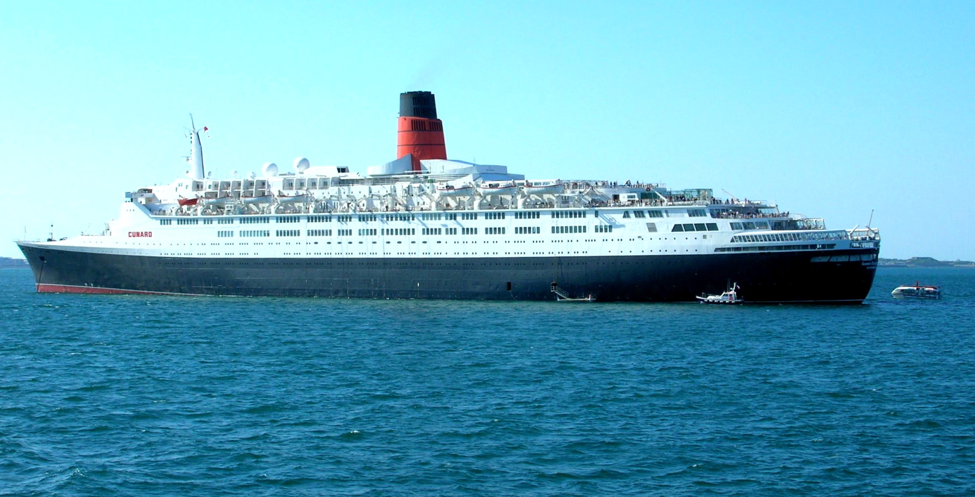 Croisière-Schëff QE2 (Elisabeth 2) (geknipst Mee 2006 bei der Kanalinsel Guernesey)